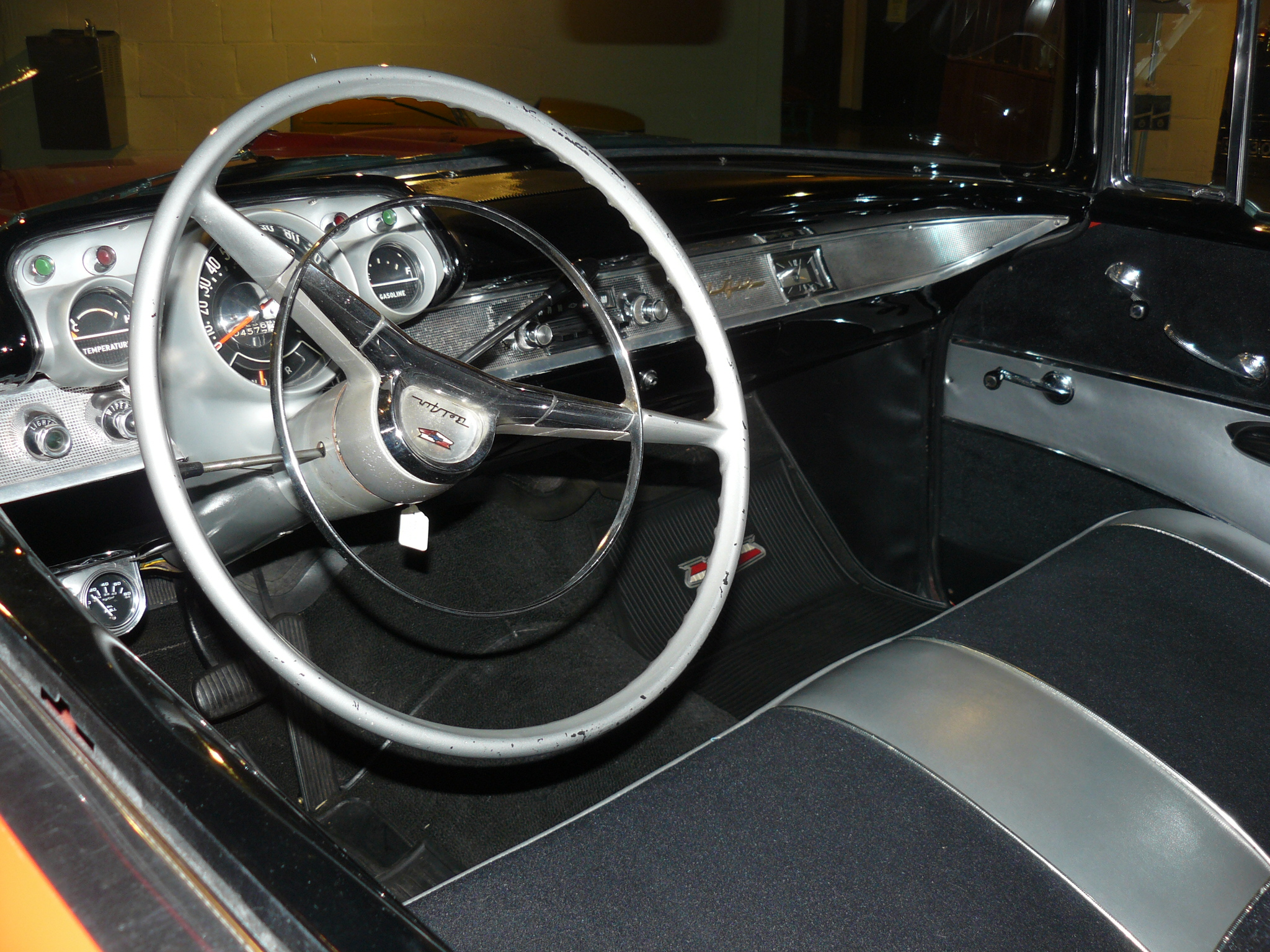 Musé d'Auburn.